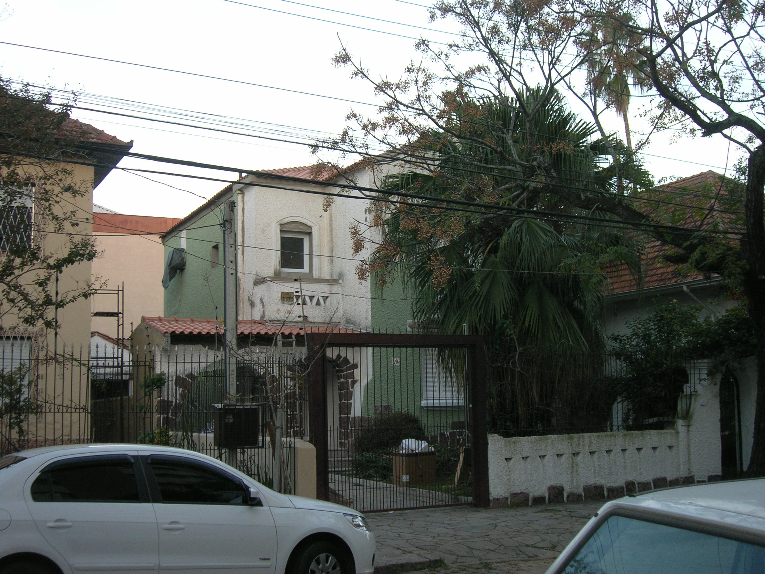 A casa onde o escritor, jornalista e dramaturgo Caio Fernando Abreu (1948-1996) viveu seus últimos anos de vida, no bairro Menino Deus em Porto Alegre, RS, Brasil. Na foto, aparece em reforma - a cor branca é a original.